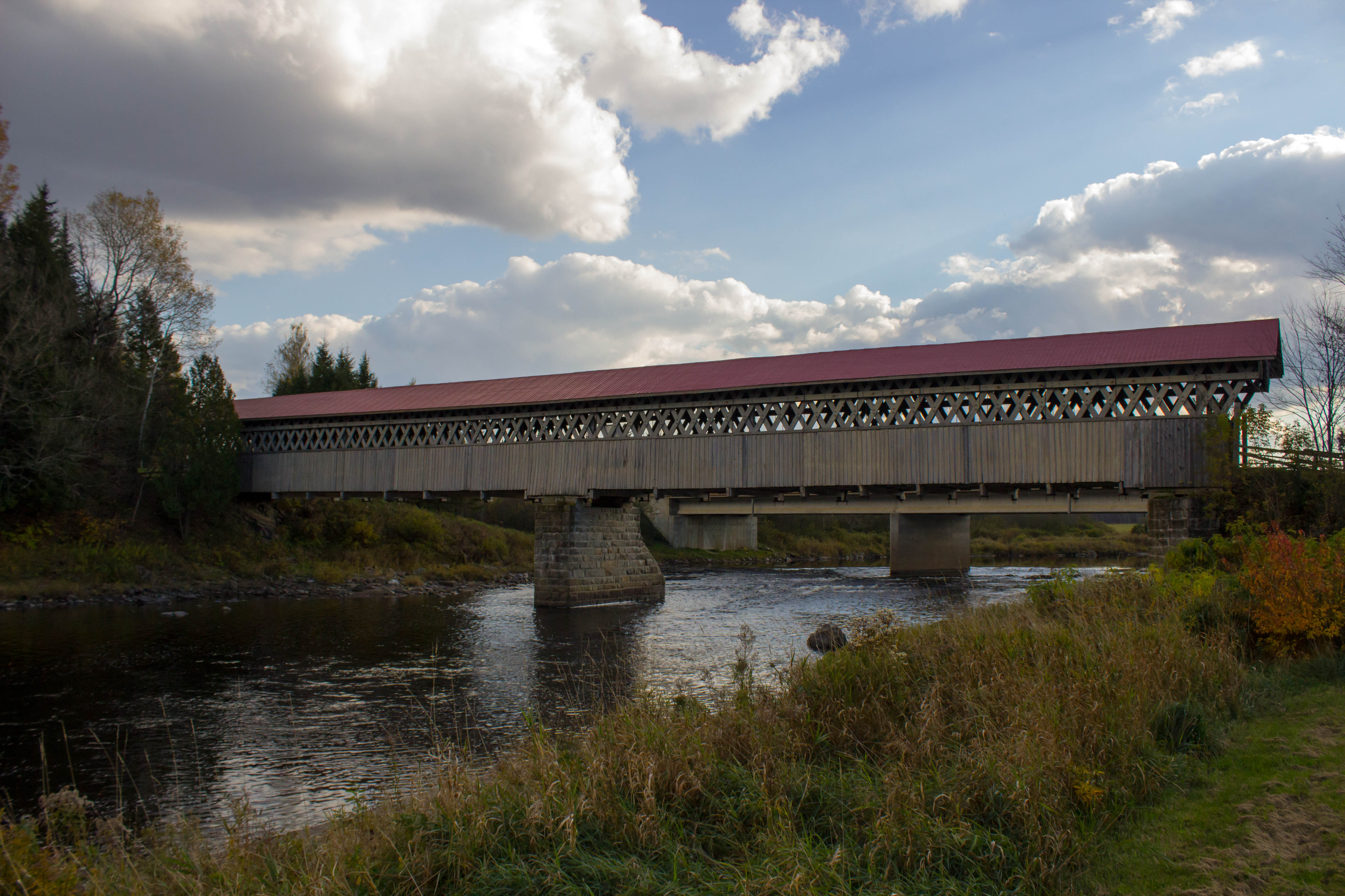 Pont McVetty-McKenzie à Lingwick (Québec)